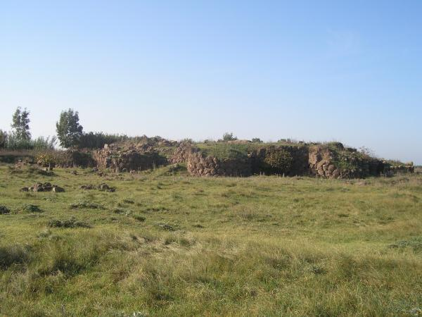 Nuraghe S'Urachi, San Vero Milis OR